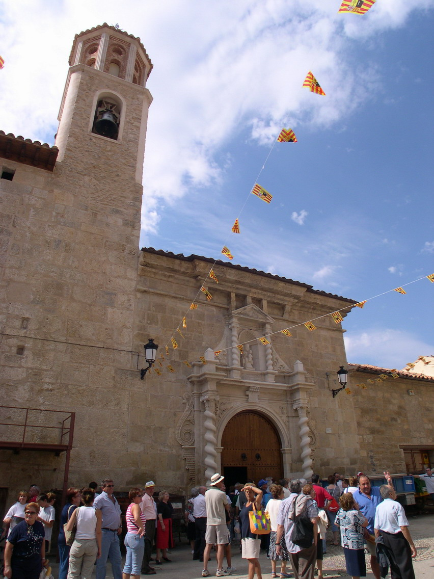 Casco histórico. Castellote, Teruel, Aragón, España/Spain arquitectura, iglesia